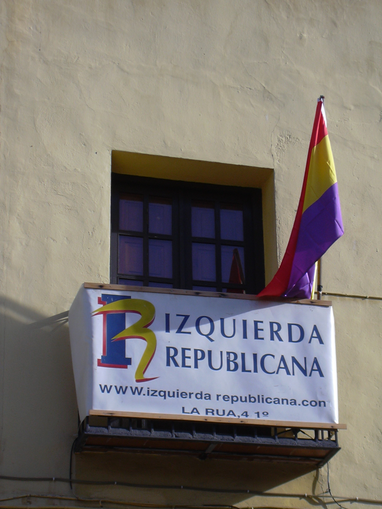 Sede de la Izquierda Republicana en el centro de León, España.